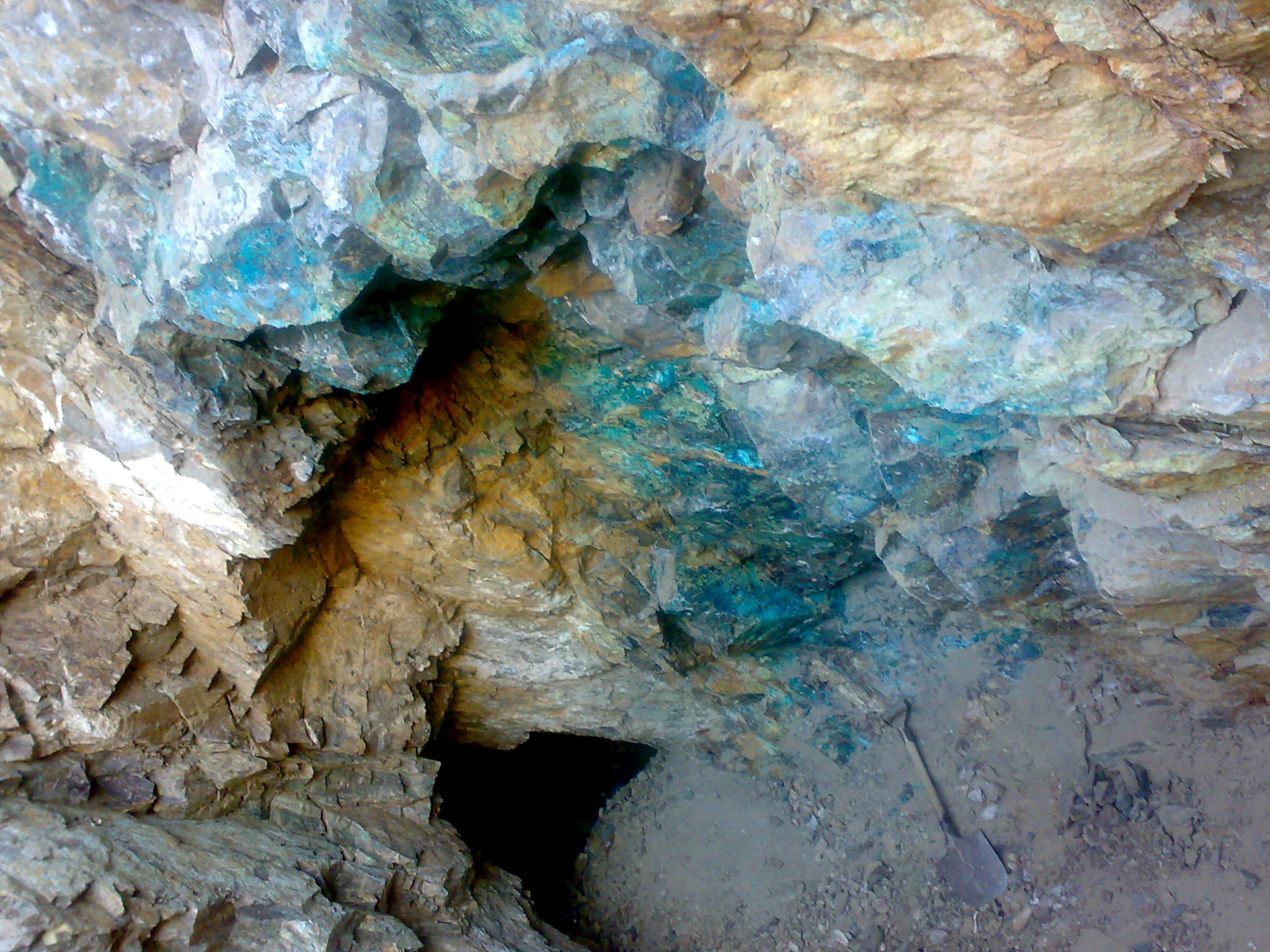 Beta de Cobre